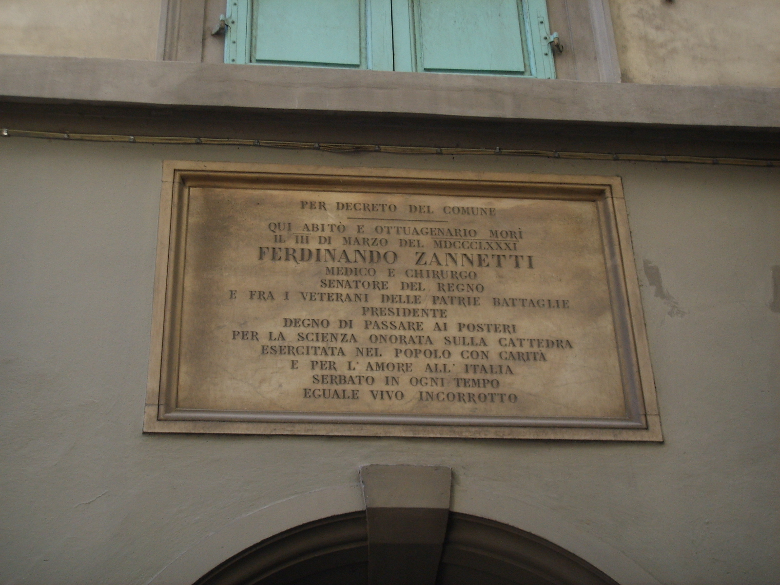 Palazzo castelli targa ferinando zannetti